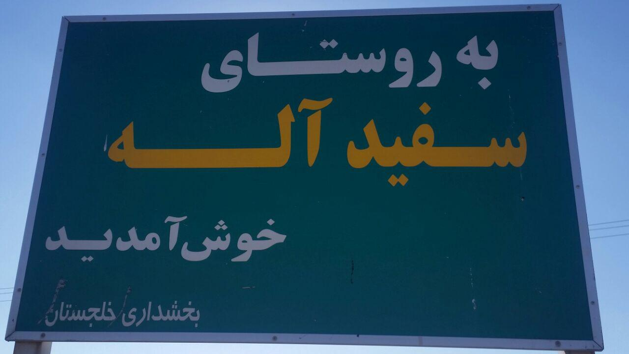 تابلو روستا سفیداله